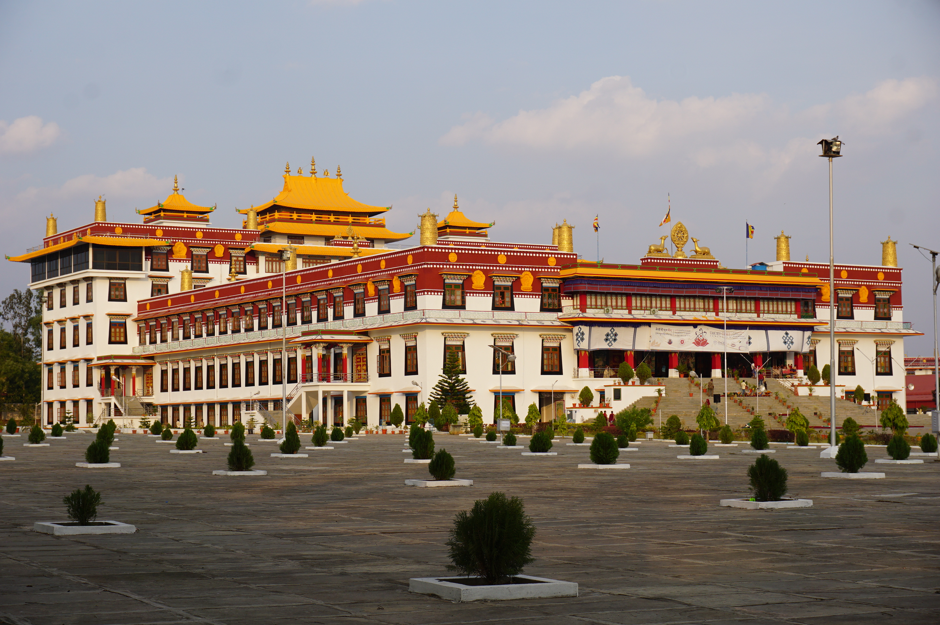 Drepung Loseling Monastery Temple (Karnataka - India)